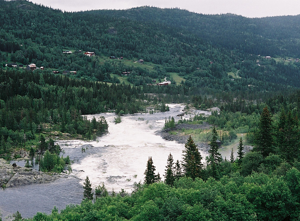 Norefallene, Numedalslågen, Nore under flommen juli 2007.